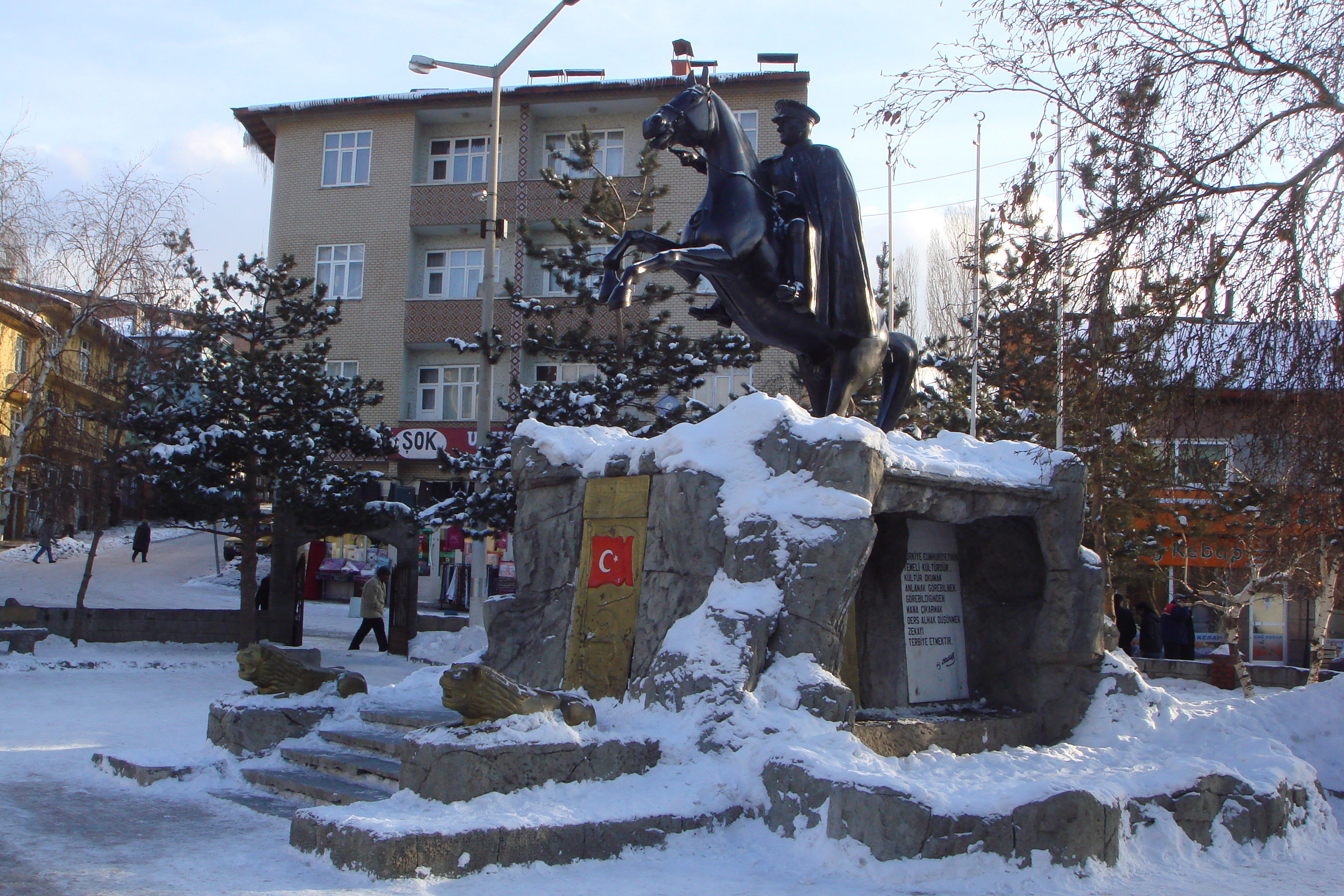 Турция, ил Карс, город Сарыкамыш, памятник Ататюрку